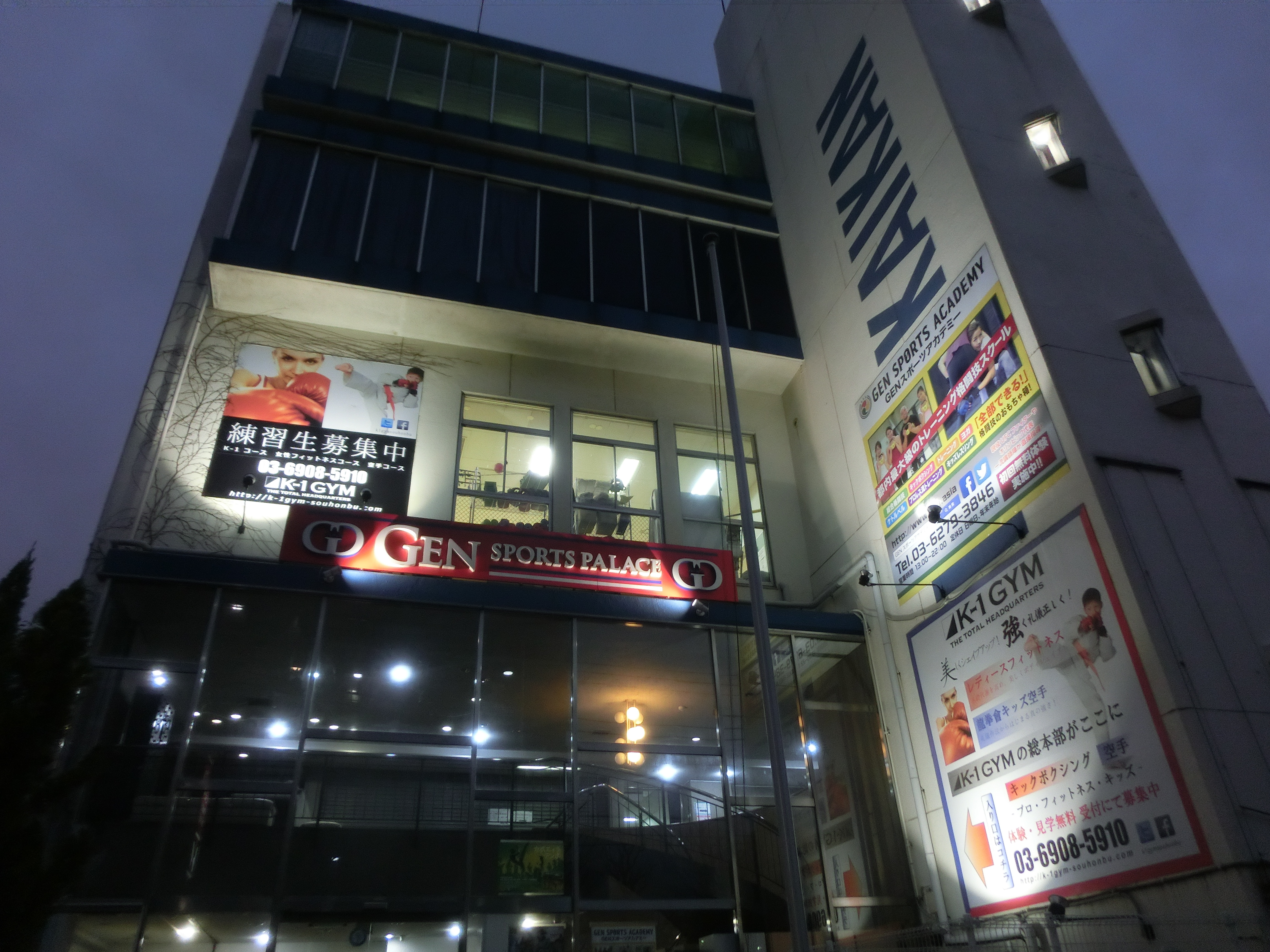 GENスポーツパレス2017年1月14日